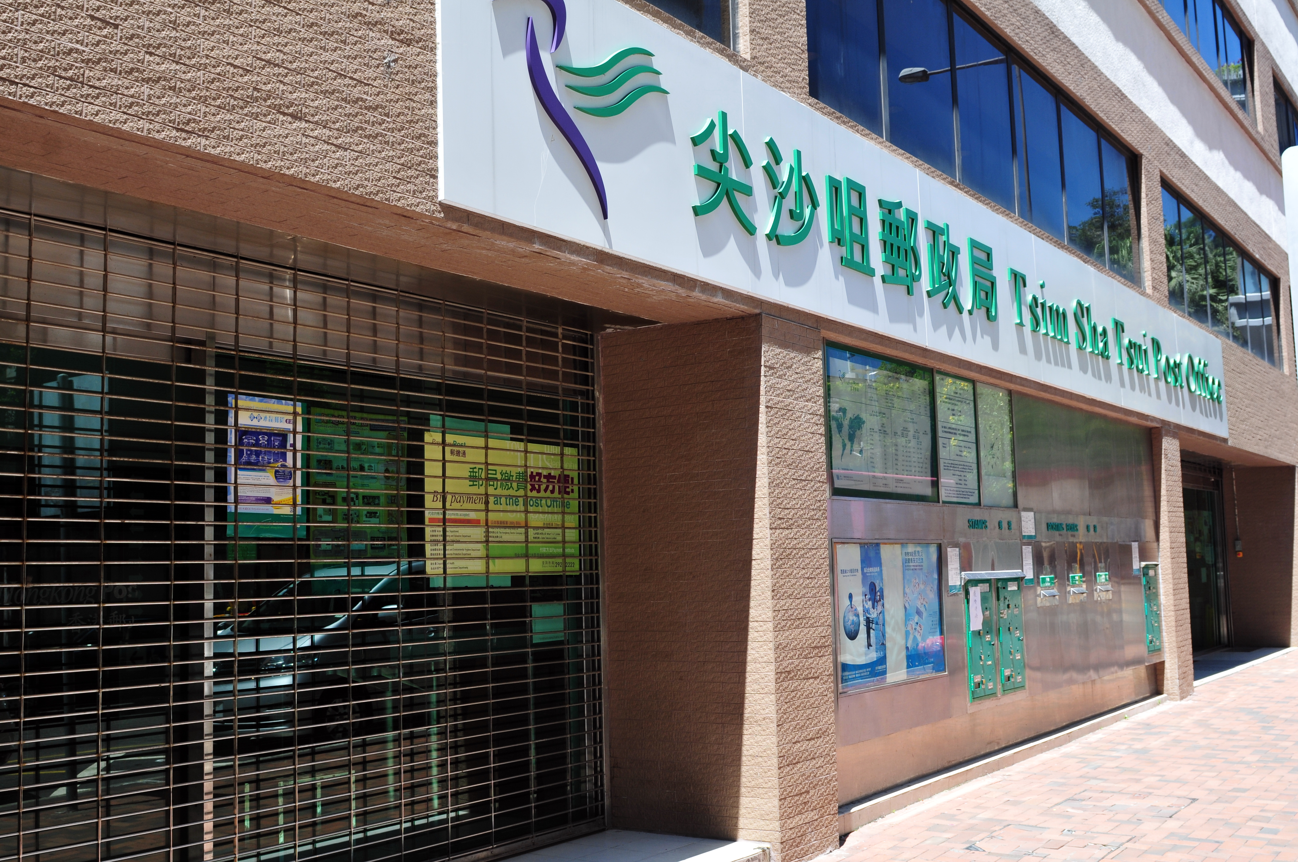 Wikimania 2013 Hongkong